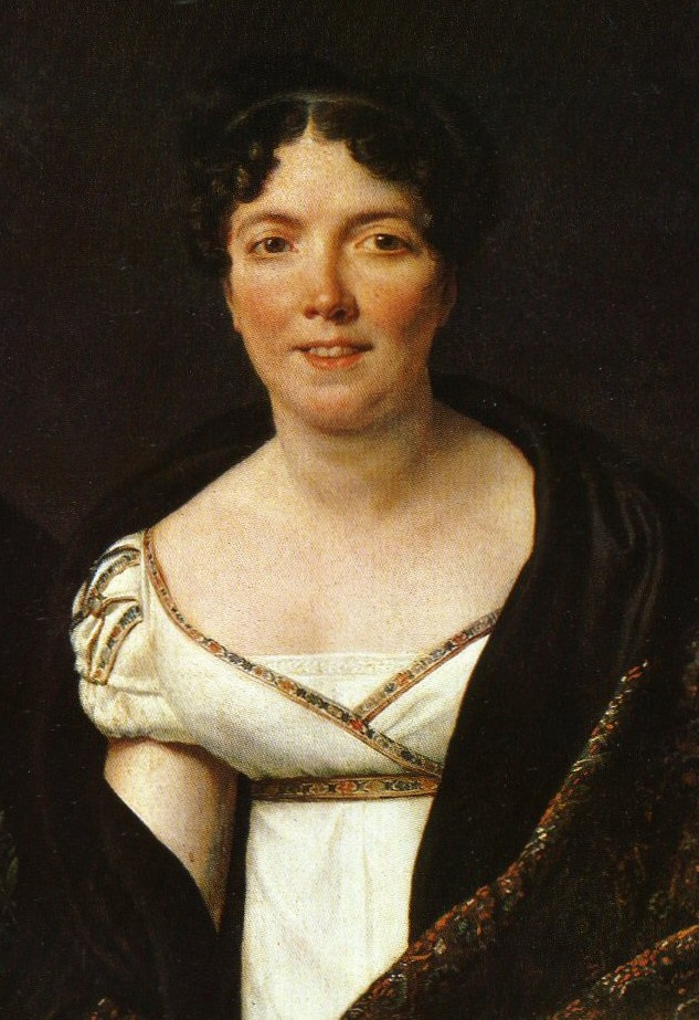 Portrait d'Antoine Mongez et de sa femme Angélique (1812), musée du Louvre Paris